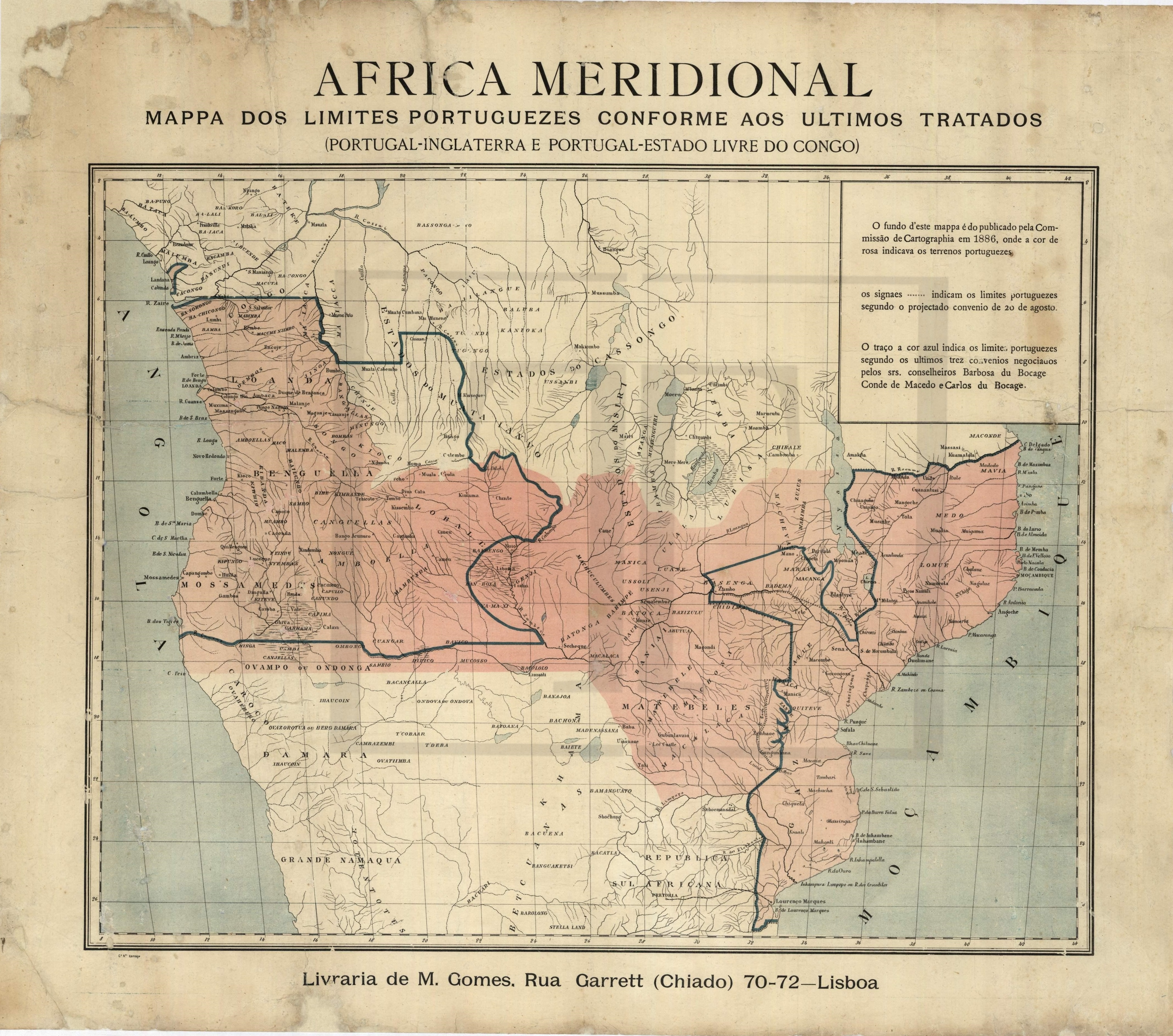 África meridional - Mapa dos limites portugueses conforme os últimos Tratados (Portugal - Inglaterra e Portugal - Estado Livre do Congo). [1886?].